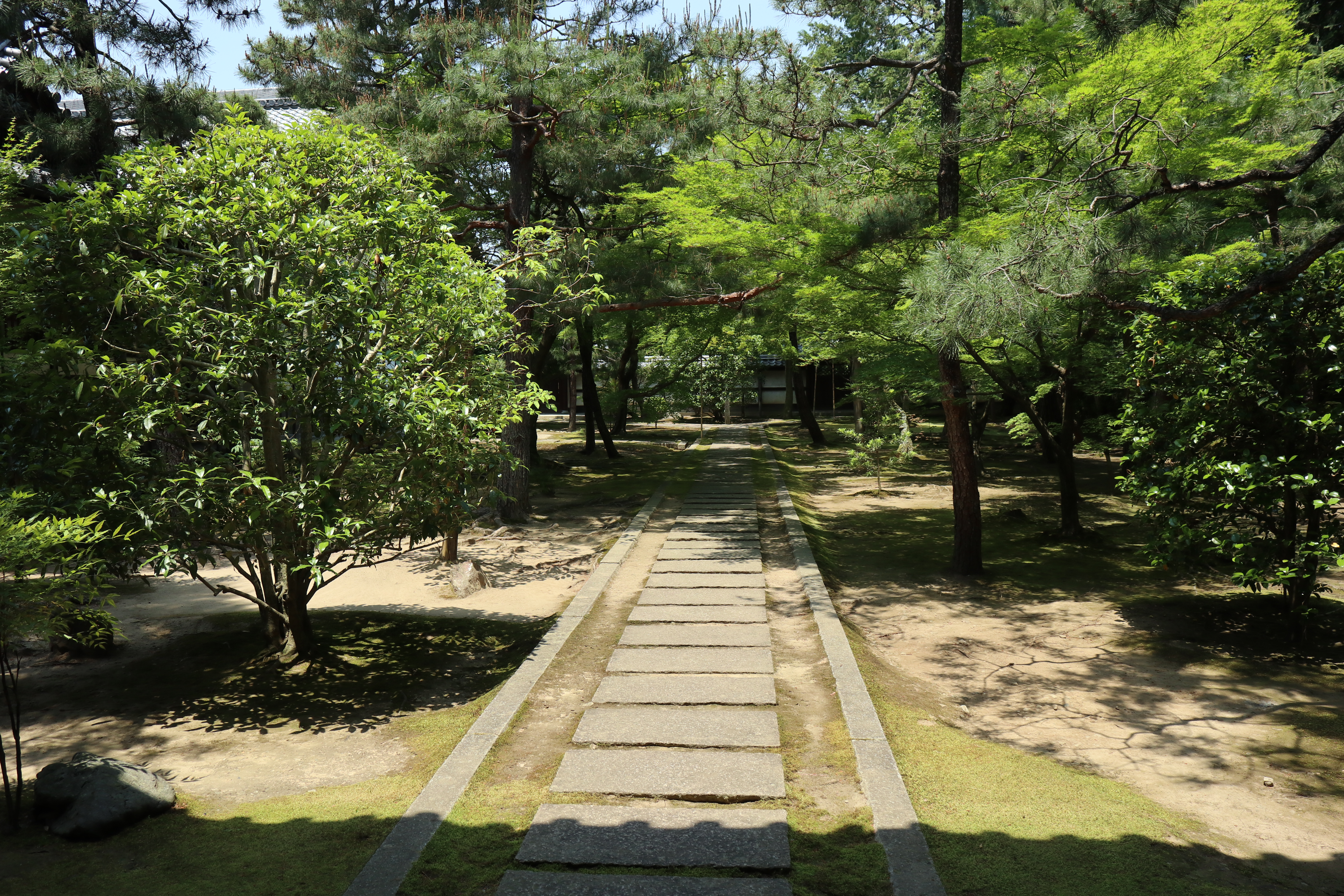 大徳寺専門道場竜翔寺